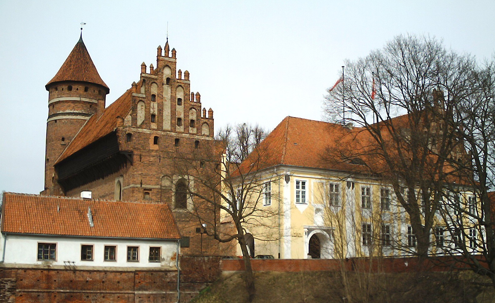 Schloss Allenstein (Olstyn, Polen)